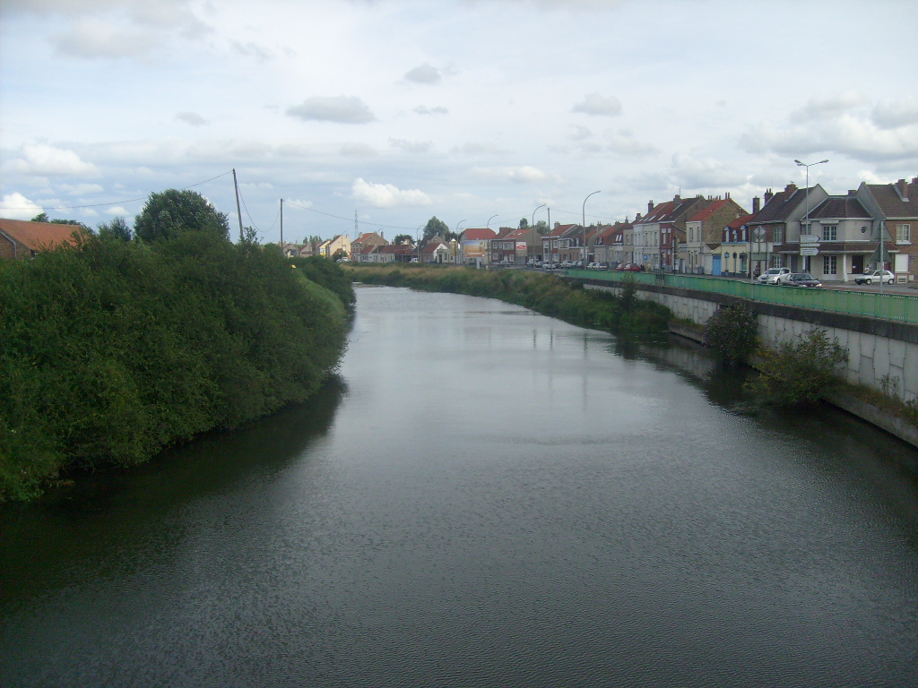 Canal de Bergues au niveau de Coudekerque-Branche, à gauche Coudekerque-Branche à droite Cappelle-la-Grande, le canal s'écoulant vers le bas.